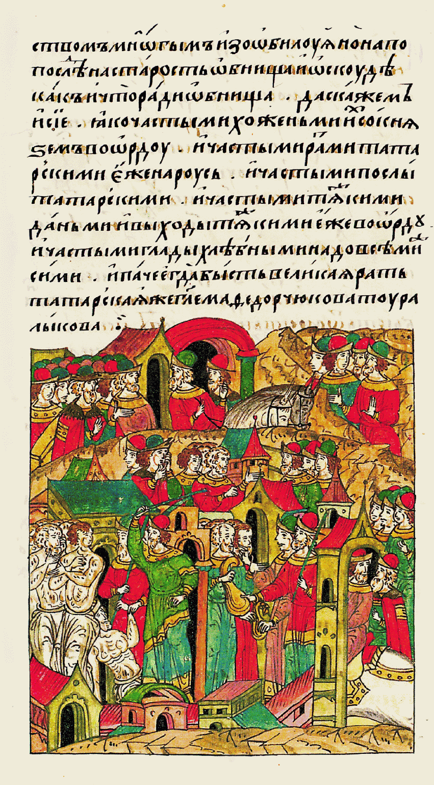 но потом, в старо- сти, обнищал, и род их оскудел. Расска- жу и о том, почему обнищал: из-за частых хождений с князем в Орду, из-за частых набегов татарских, которые испытывала Русь, из-за частых приходов татарских послов, из-за частых тяжких даней и по- боров ордынских, из-за частых голодных хлебных лет. Но самой тяжкой бедой был набег великой рати татарской, называе- мой Федорчукова рать Туралыкова. [И после него еще год продолжа- лось насилие, потому что великое княжение Московское досталось великому князю Ивану Дани- ловичу, и княжение Ростовское также отошло к Москве. Увы, увы тогда горо- ду Ростову, особенно князьям ростовским, когда отнята была у них власть, а вели- кое княжение, иму- щество, честь и слава, и все прочее отошло к Москве! По повеле- нию великого князя Ивана Даниловича был послан из Мо- сквы в Ростов воево- дой один из вельмож по имени Василий, прозвищем Кочева, и с ним Мина. И когда вошли в город Ростов, то принесли огром- ное бедствие городу и всем, живущим в нем. Умножились гонения, и немало пришлось им отдать москвичам имущества своего, а сами уда- ры по телам своим с укором получали и с пустыми руками отходили. И многие оказались в бедствен- ном положении, пото- му что не только всего имущества лишились, но и получили раны на теле, и беду эту жа- лостно носили в себе, и терпели.]